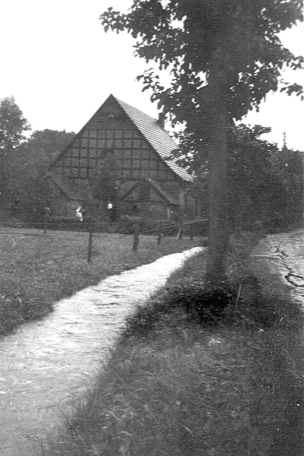 Preußisch Oldendorf, Großer Dieckfluss: Oldendorf Nr. 30a mit Umgehungsgraben an der Bergstraße